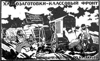 "Getreidebeschaffung ist Klassenkampf! Rote Wagenzüge den Kulaken entgegen!" Plakat aus der Getreidebeschaffungskampagne in der Sowjetunion 1930. Unbekannter Künstler.